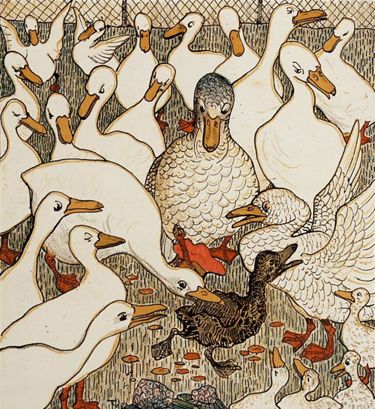 Theo van Hoytema, Le vilain petit canard d'après le conte d'Andersen, 1893. Mais le pauvre canet qui était sorti du dernier œuf fut, pour sa laideur, mordu, poussé et bafoué, non-seulement par les canards, mais aussi par les poulets.